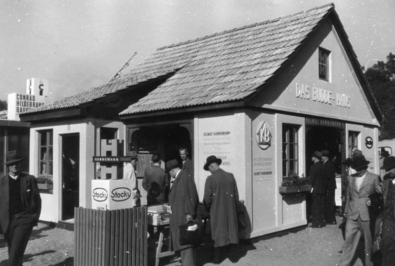 Frankfurt/Main, Budde-Fertighaus Das Buddehaus kostet DM 10.000.-- Auch in Frankfurt/Main steht wie auf sämtlichen bisherigen Ausstellungen der Zonen das Wohnungs- und Bauproblem an erster Stelle. Unser Bild zeigt das Budde-Fertighaus auf der zur Zeit stattfindenden Frankfurter Messe. Sein Aufbau dauert 10 Tage - die Kosten betragen rund DM 10.000-- für das Vierzimmerhaus. 5-10-48 Illus-dpd